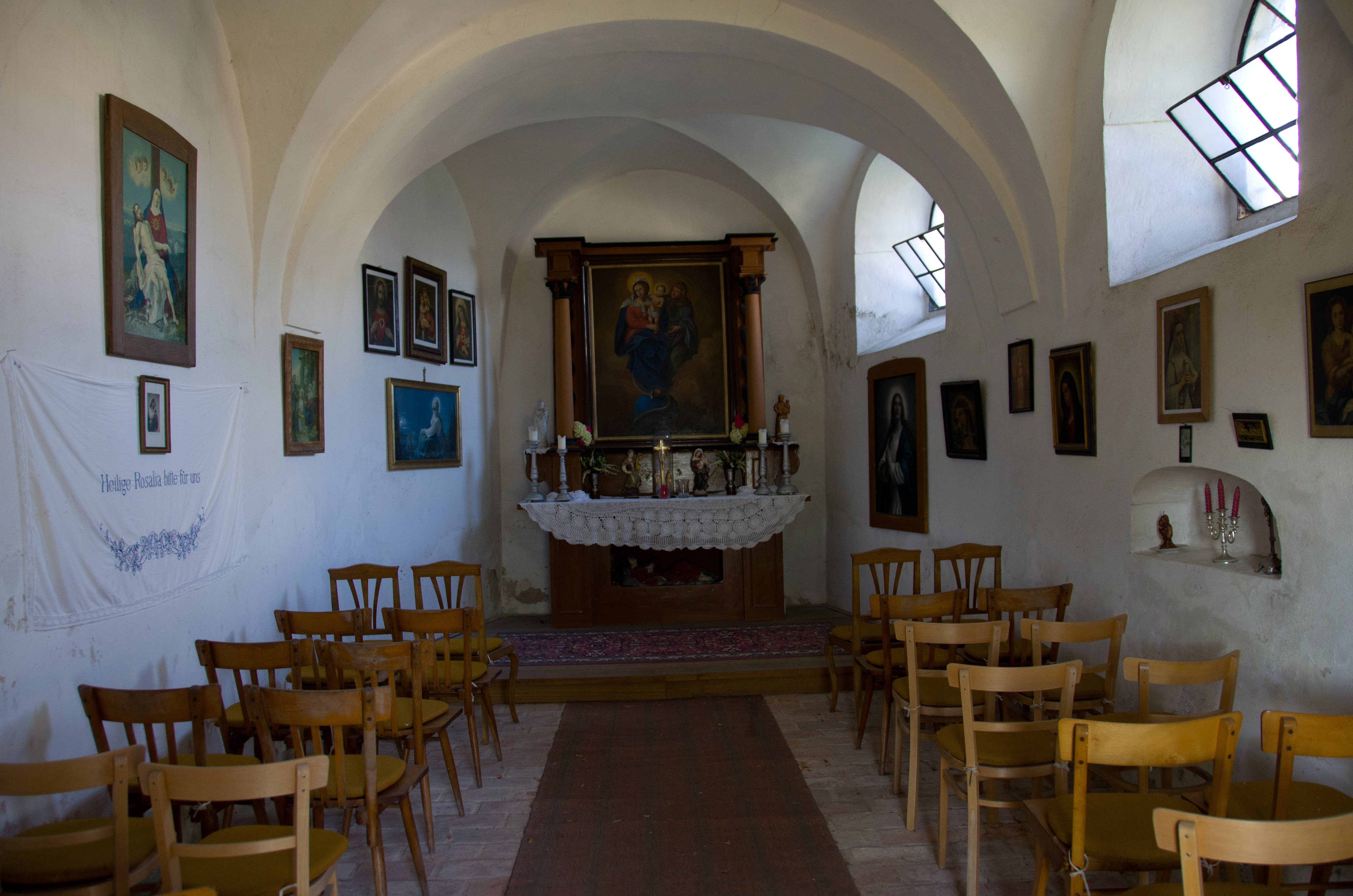 Rosalienkapelle